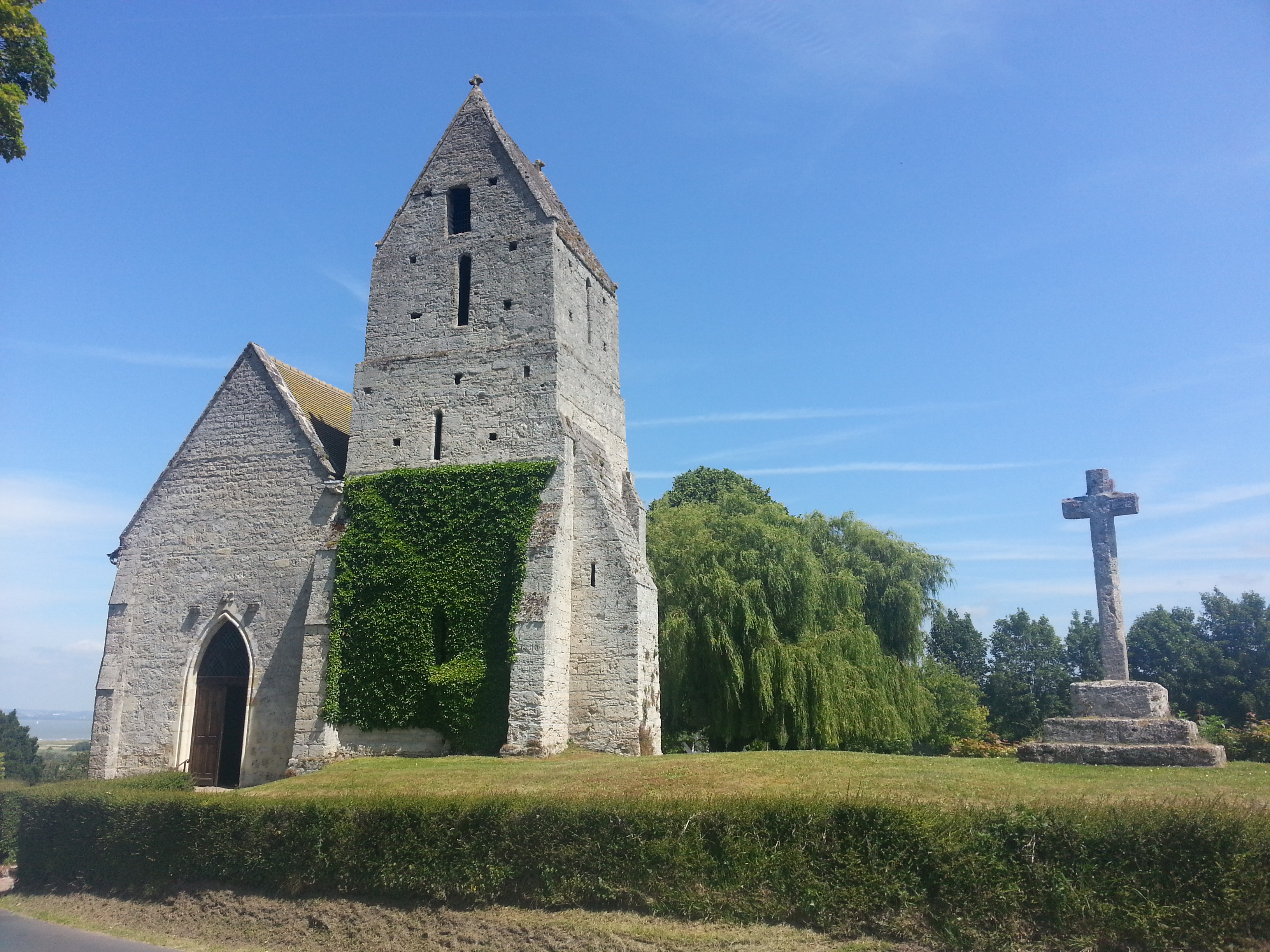 Église Saint-Martin de Cricqueboeuf